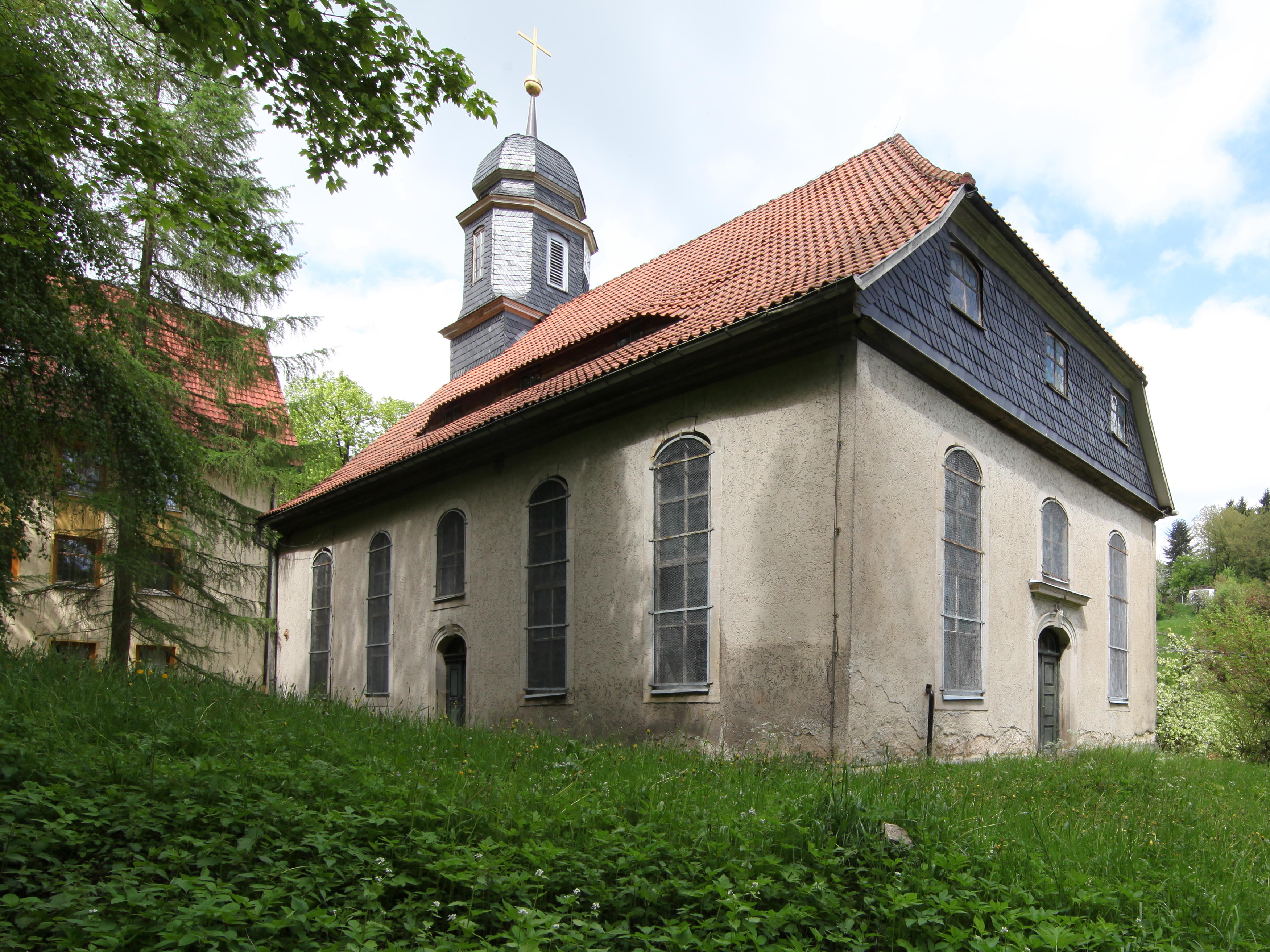 Evangelische Kirche Neundorf, Ortsteil von Suhl. 1763 Errichtung der barocken Kirche, innen geschlossene bauzeitliche Ausstattung mit Kanzelaltar, Orgel und Empore